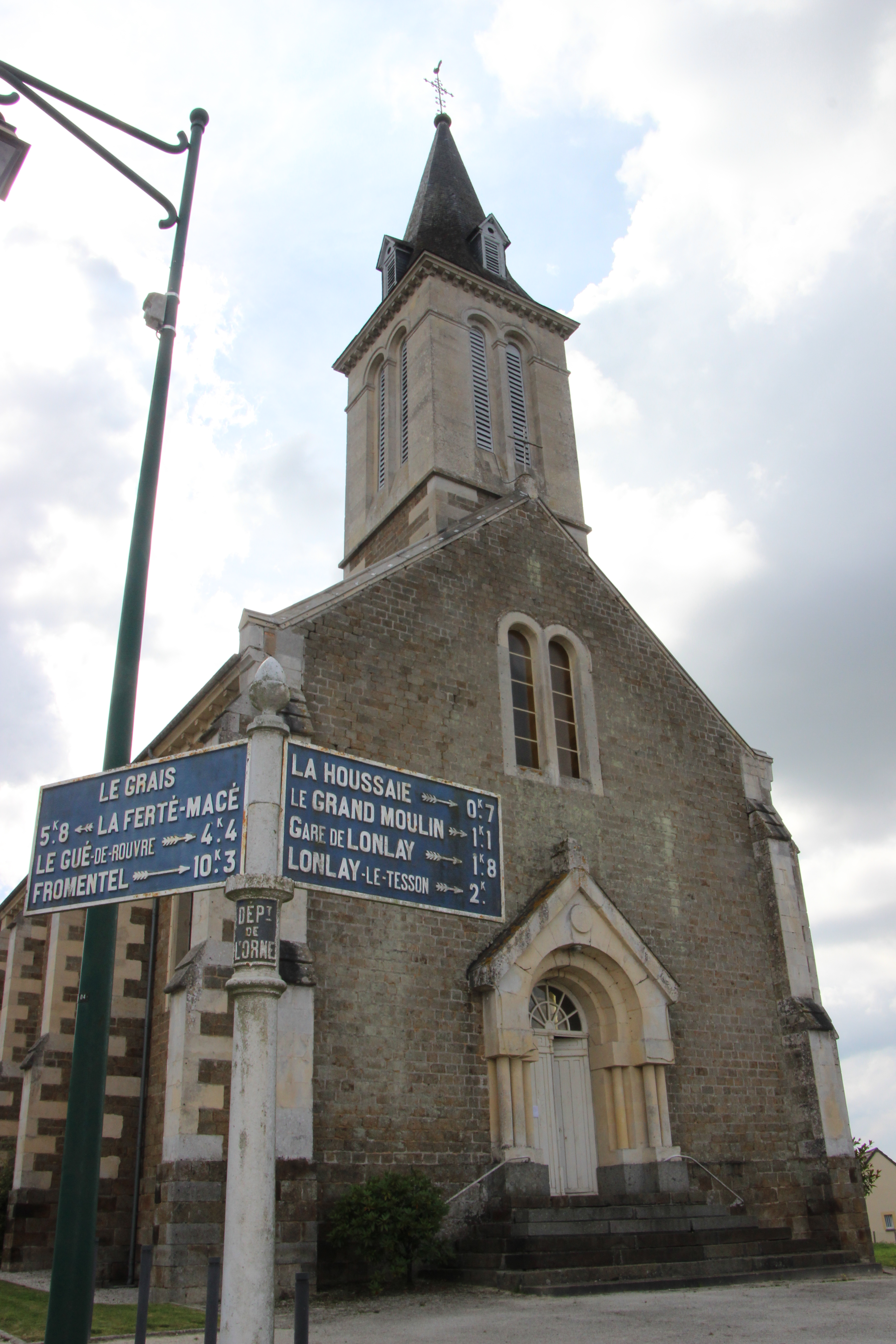 église Le Grais